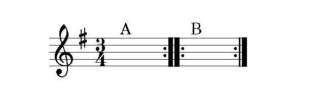 O forma tipica de menuet.